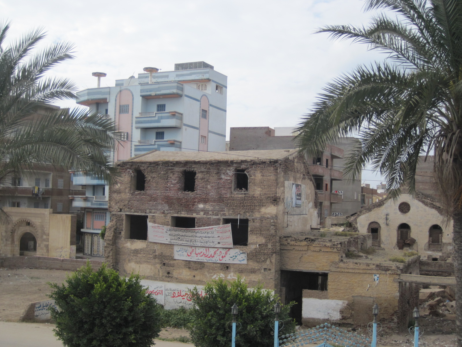 ما تبقى من مصنع طرابيش الملك محمد على باشا بمدينة فوه بمحافظة كفر الشيخ التراثية الذى أنشأ فى عام 1824